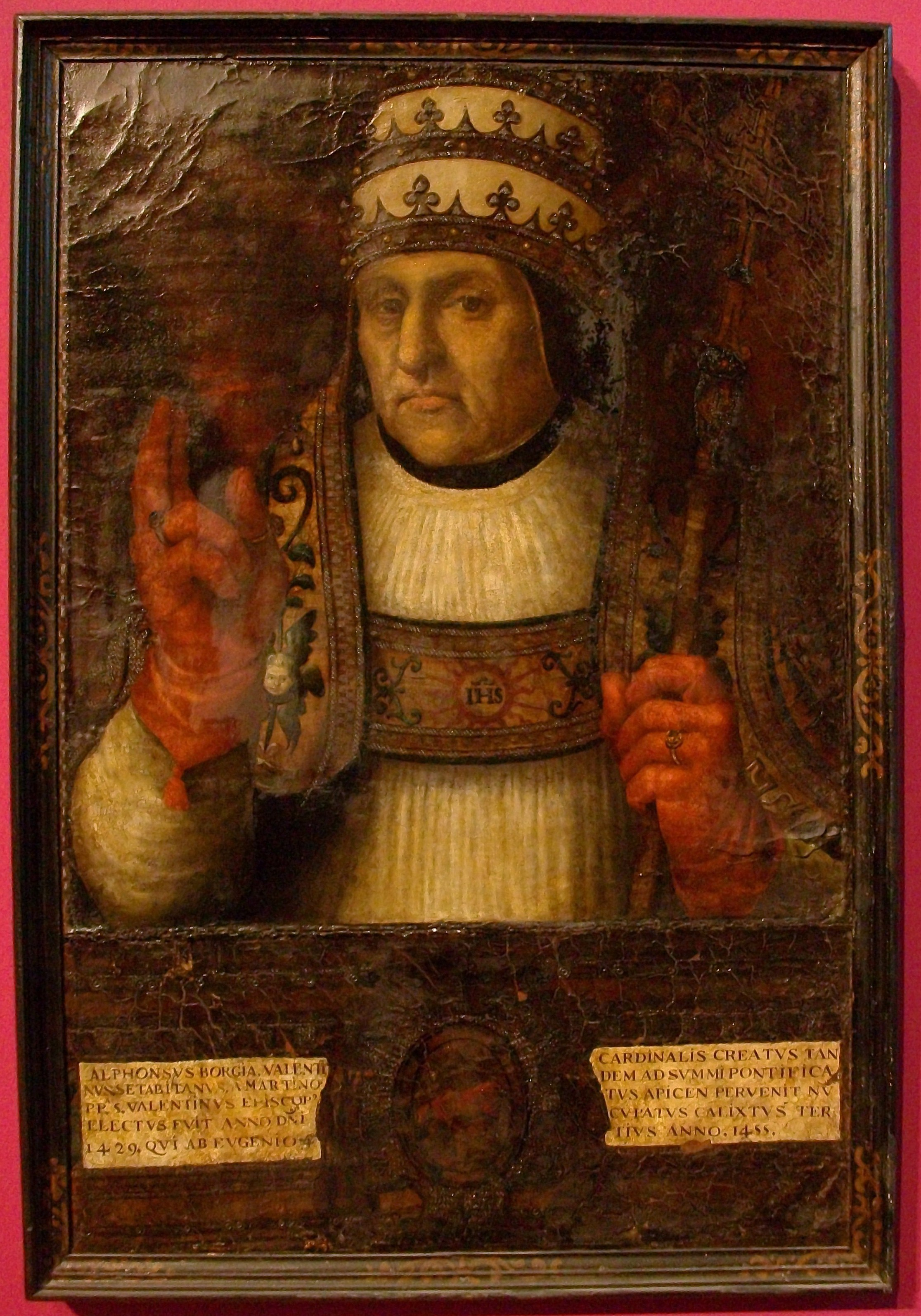 Retrato del eclesiástico español Alfonso de Borja y Cavanilles (1378-1478), que posteriormente llegaría a ser papa de la Iglesia Católica con el nombre de Calixto III.